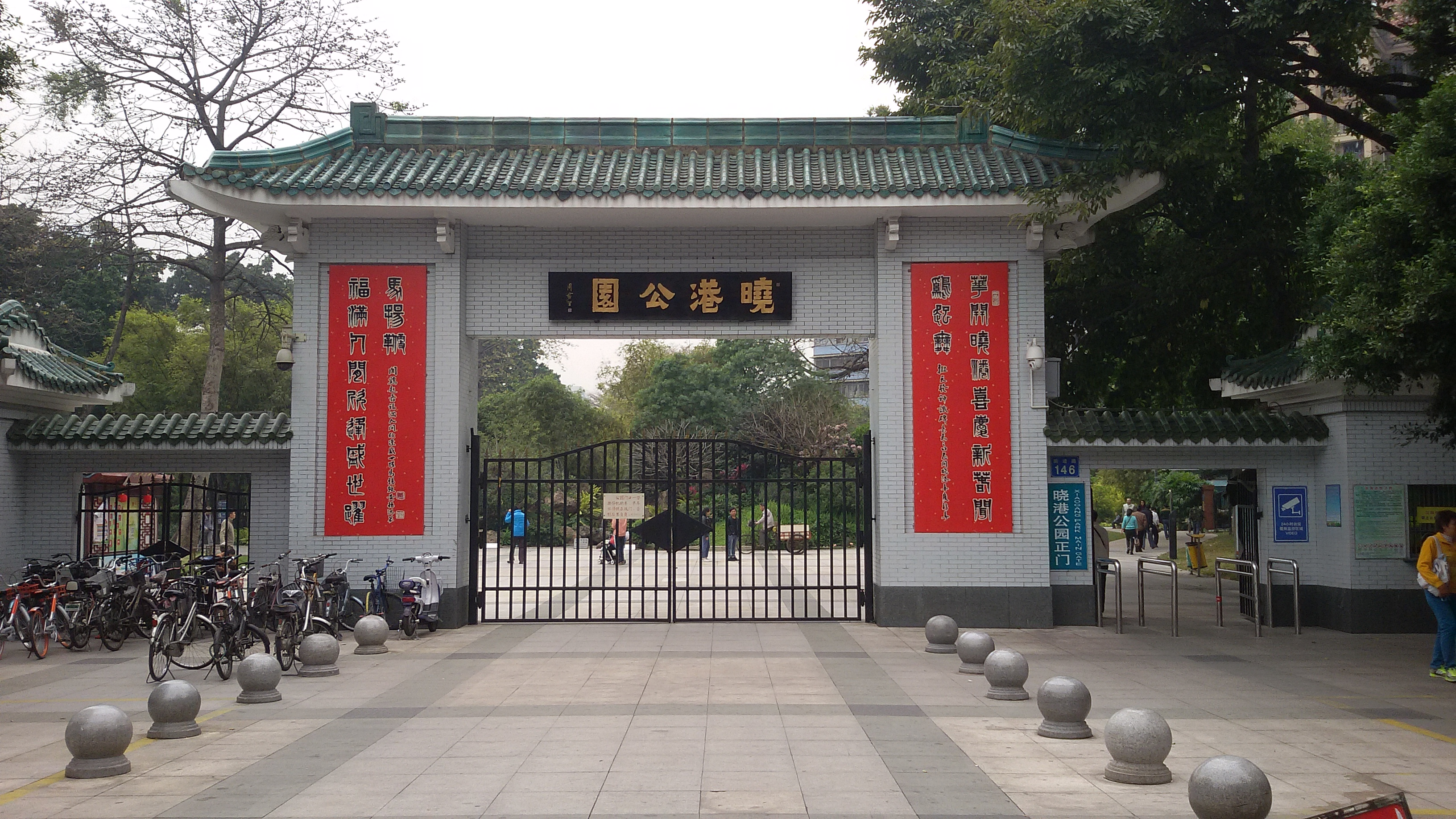 粵語: 晓港公园北门